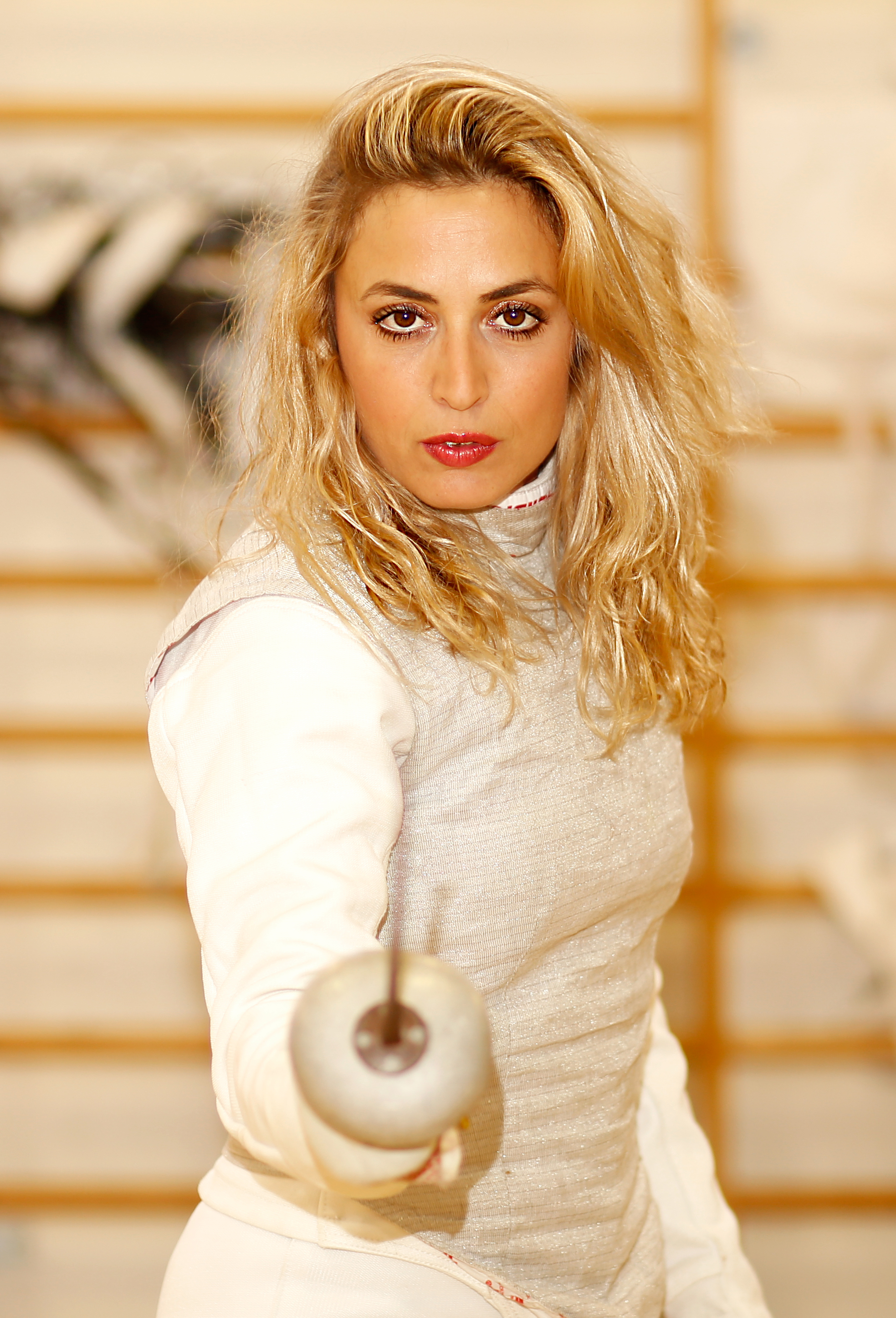 הסייפת דלילה חטואל